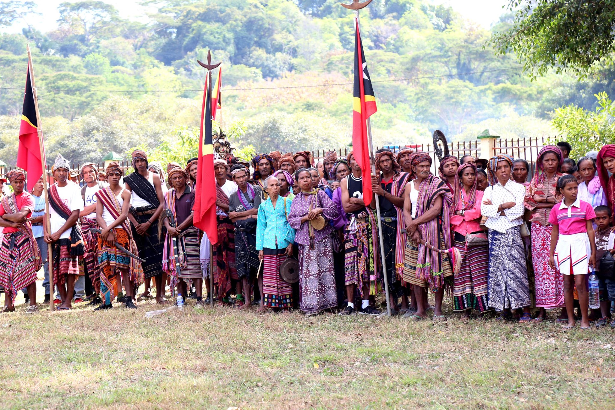 Feierlichkeiten im Parque Dom Boaventura zum 20-jährigen Jubiläum des Unabhängigkeitsreferendums